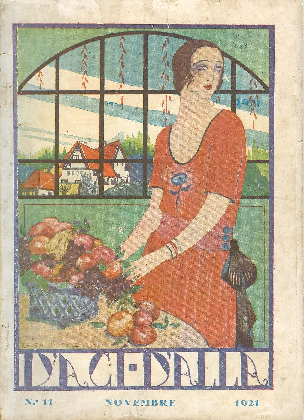 Fotografia pròpia de la i.lustració de la Laura Albéniz, a la portada de la revista D'ací d'allà, 1921